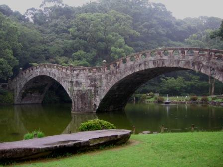 諫早市高城町の諫早公園内の池に架かる眼鏡橋。2007年7月3日、投稿者撮影。